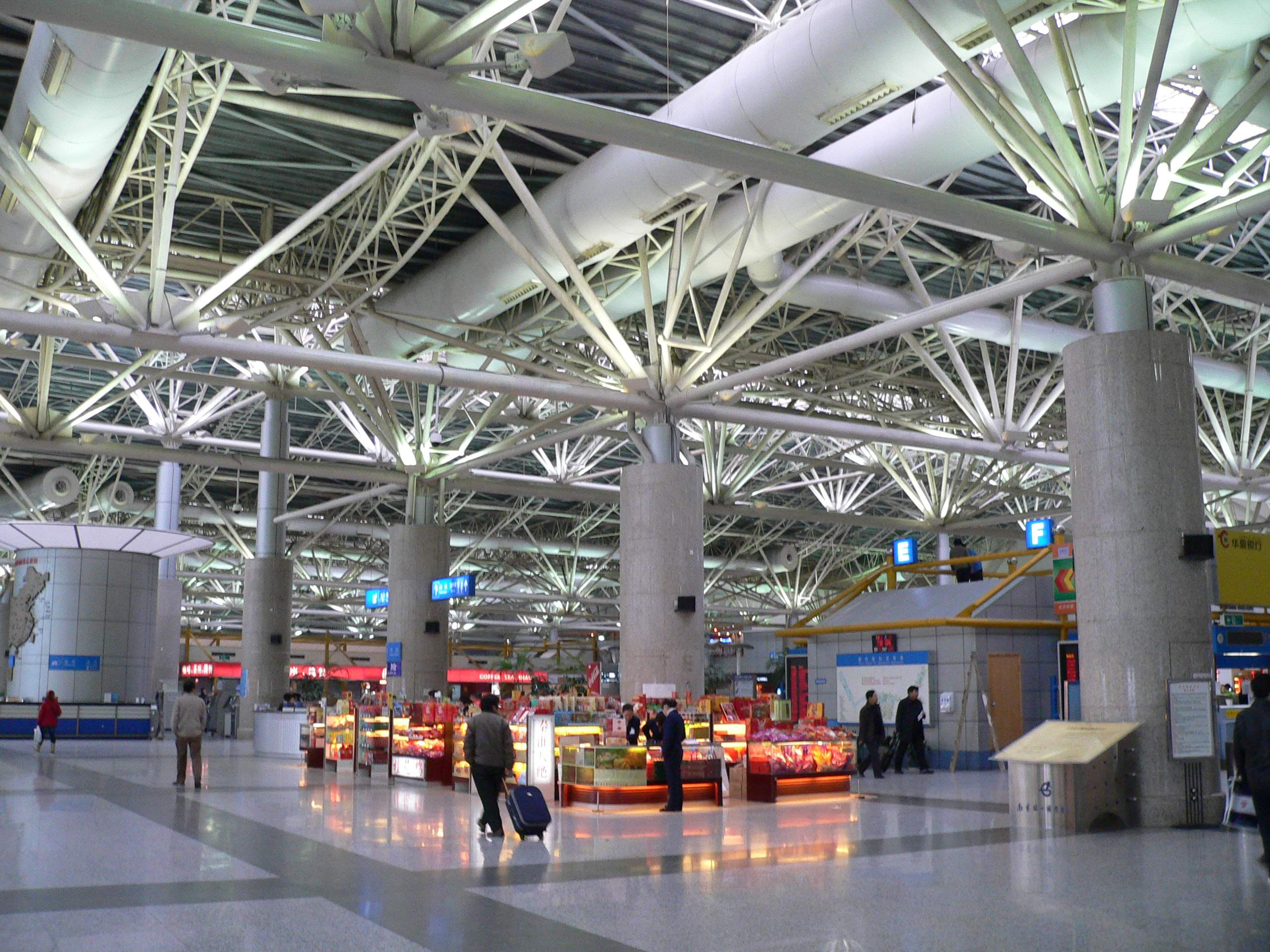 禄口机场